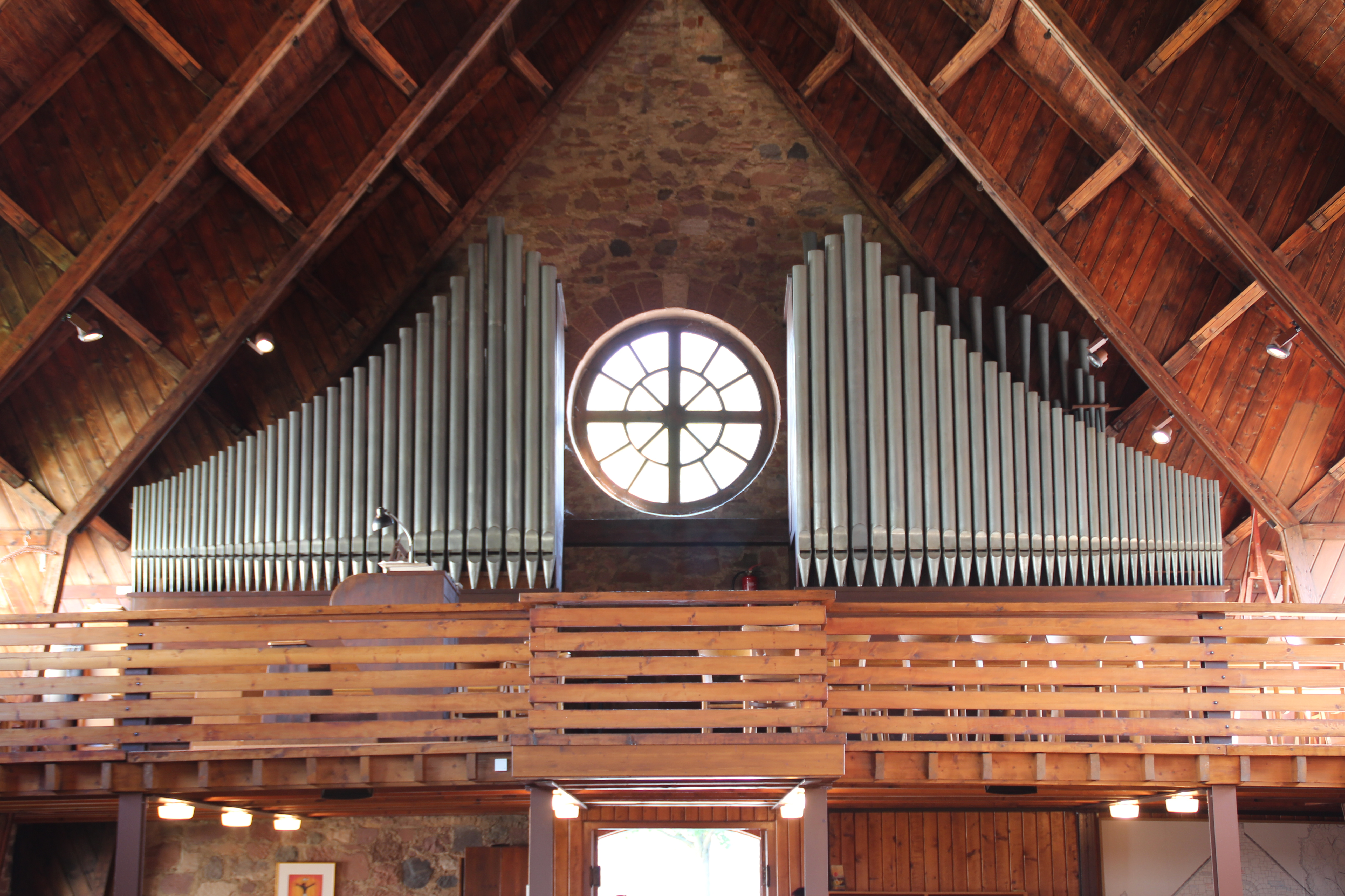 Orgel der Pankratiuskapelle, Gießen, Hessen, Deutschland